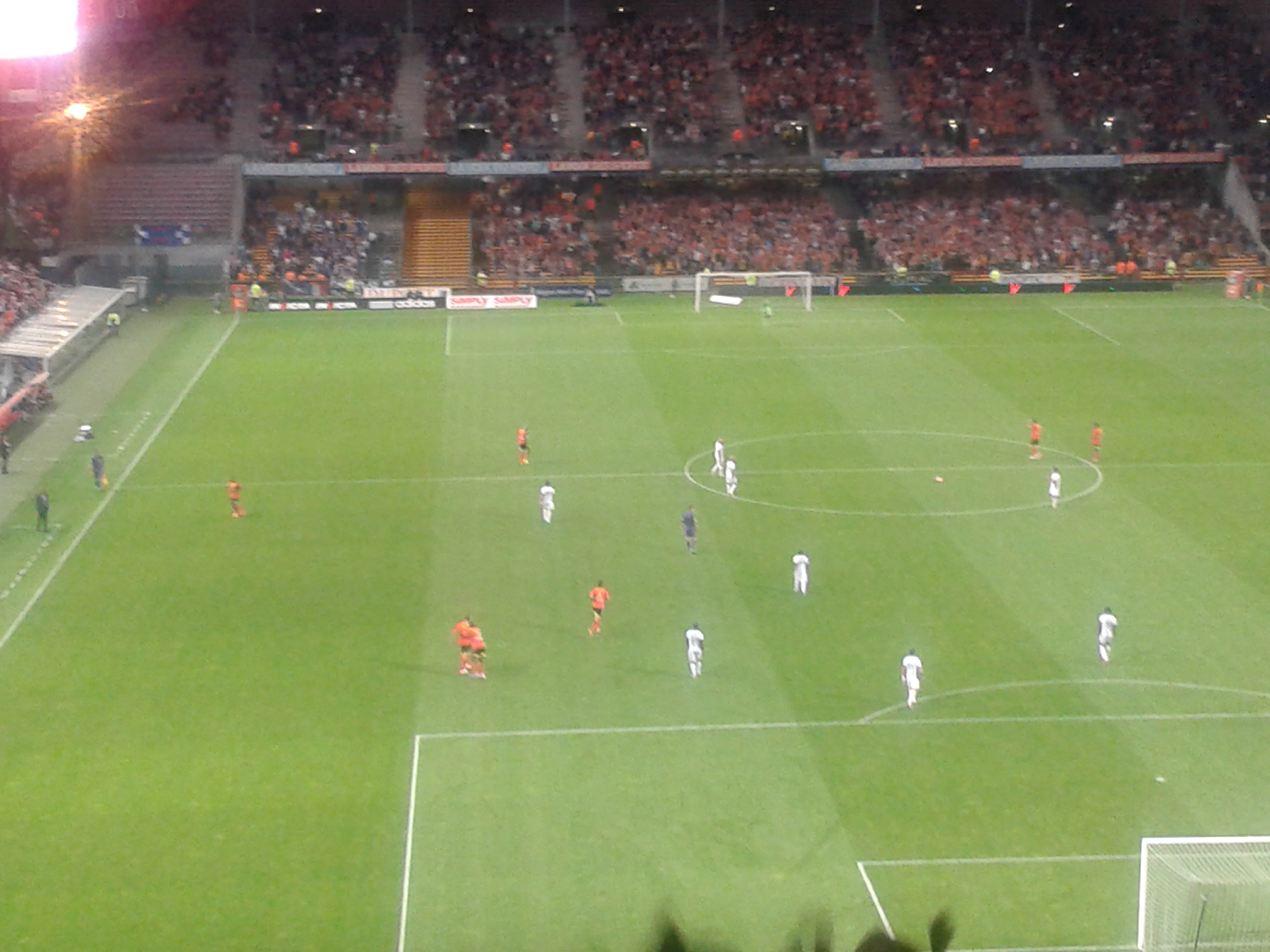 RC Lens - ES Troyes AC, le 30 août 2013, au Stade Bollaert-Delelis, pour le championnat de France de football de Ligue 2 (deuxième division française).